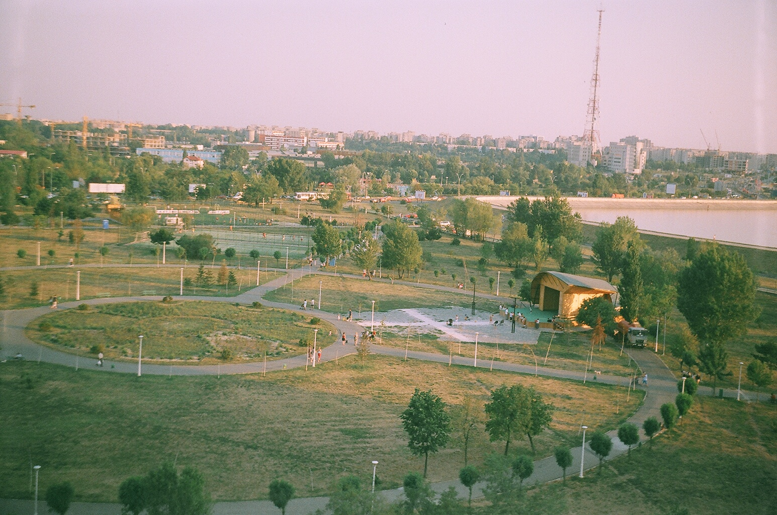 Parcul Crângaşi şi latura de sud-est a Lacului Morii. --Petrvs 26 august 2007 22:51 (EEST)Petrus Lungu